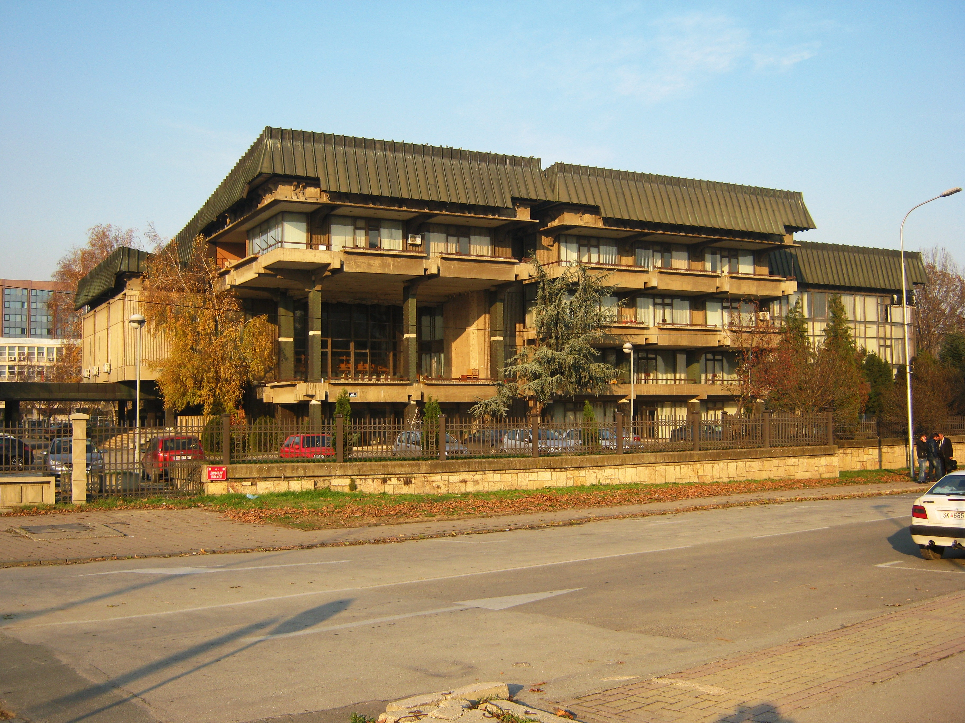 М А Н У